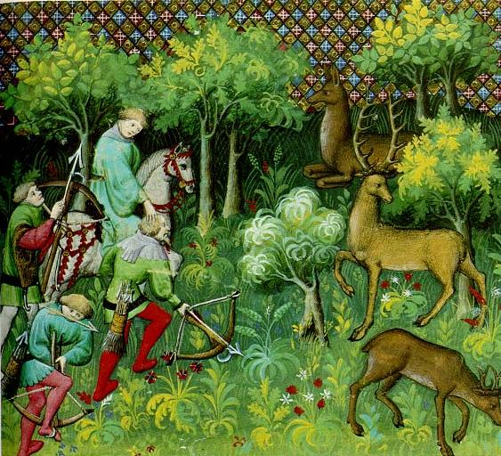 Лес в средневековой Франции. Миниатюра из «Le Livre de la Chasse France» (1405—1410)